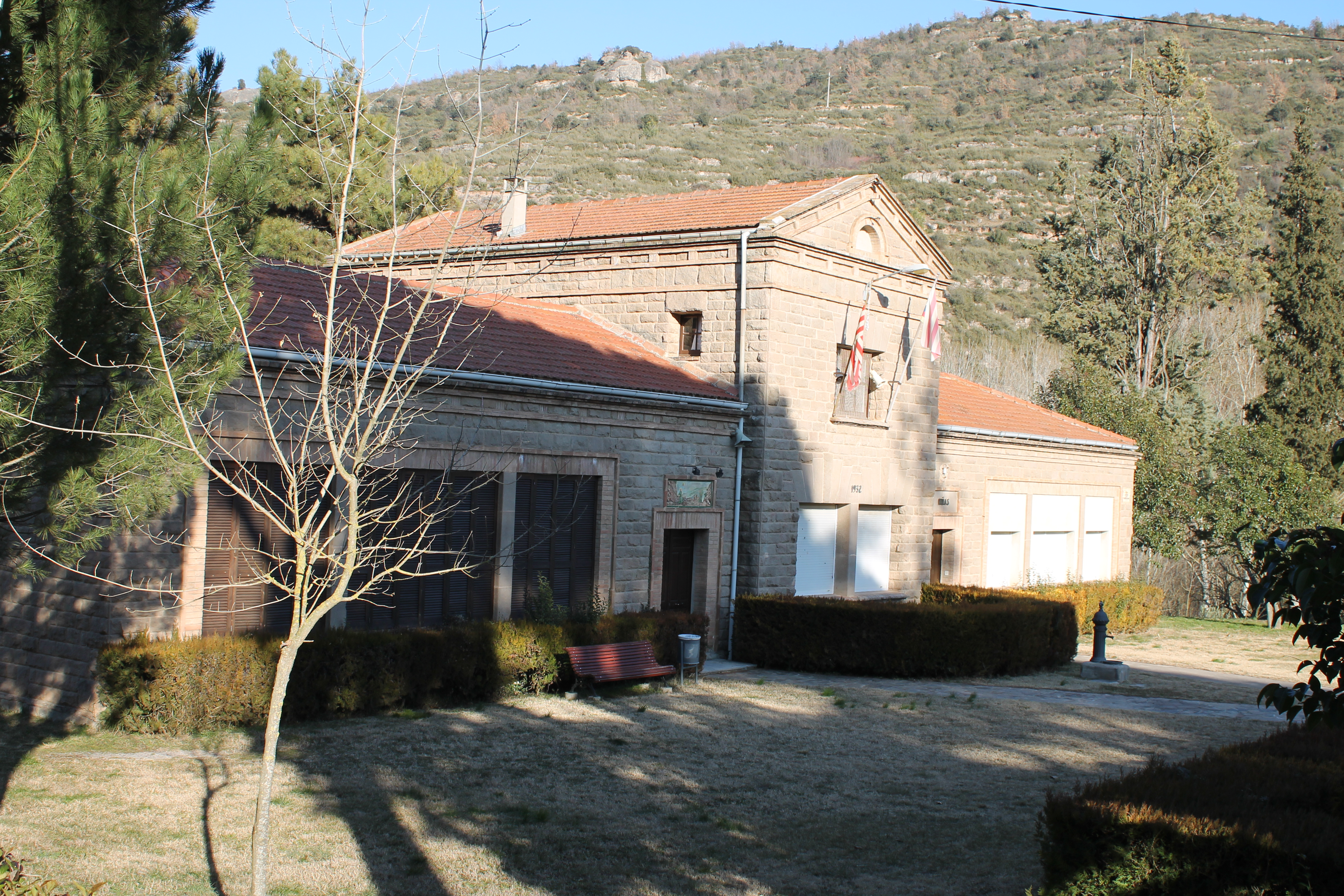 Edifici de serveis de la colònia del Guixaró: antigues escoles i capella.